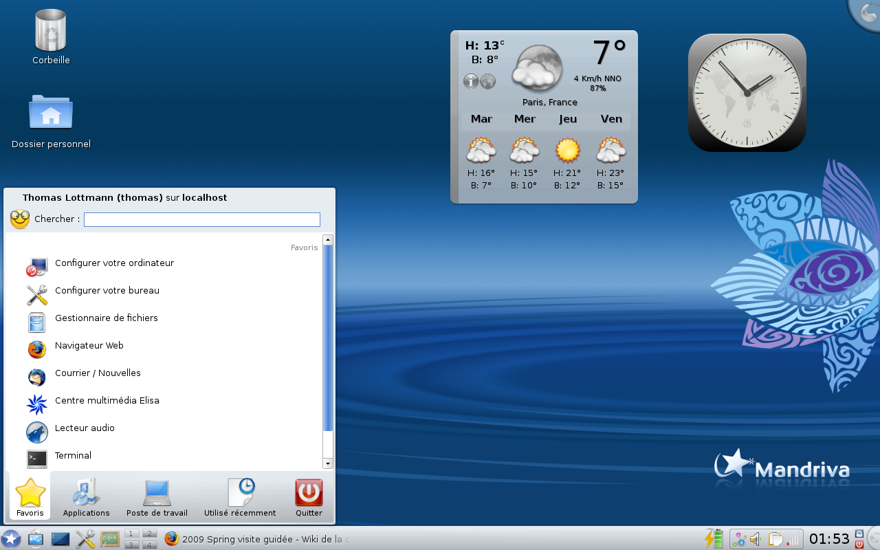 Bureau de Mandriva Linux 2009 Spring